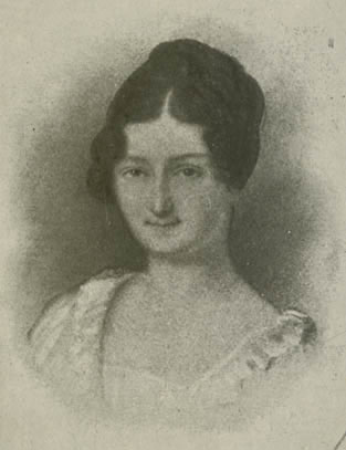 Ritratto presunto di Matilde Viscontini Dembowski (1790-1825)